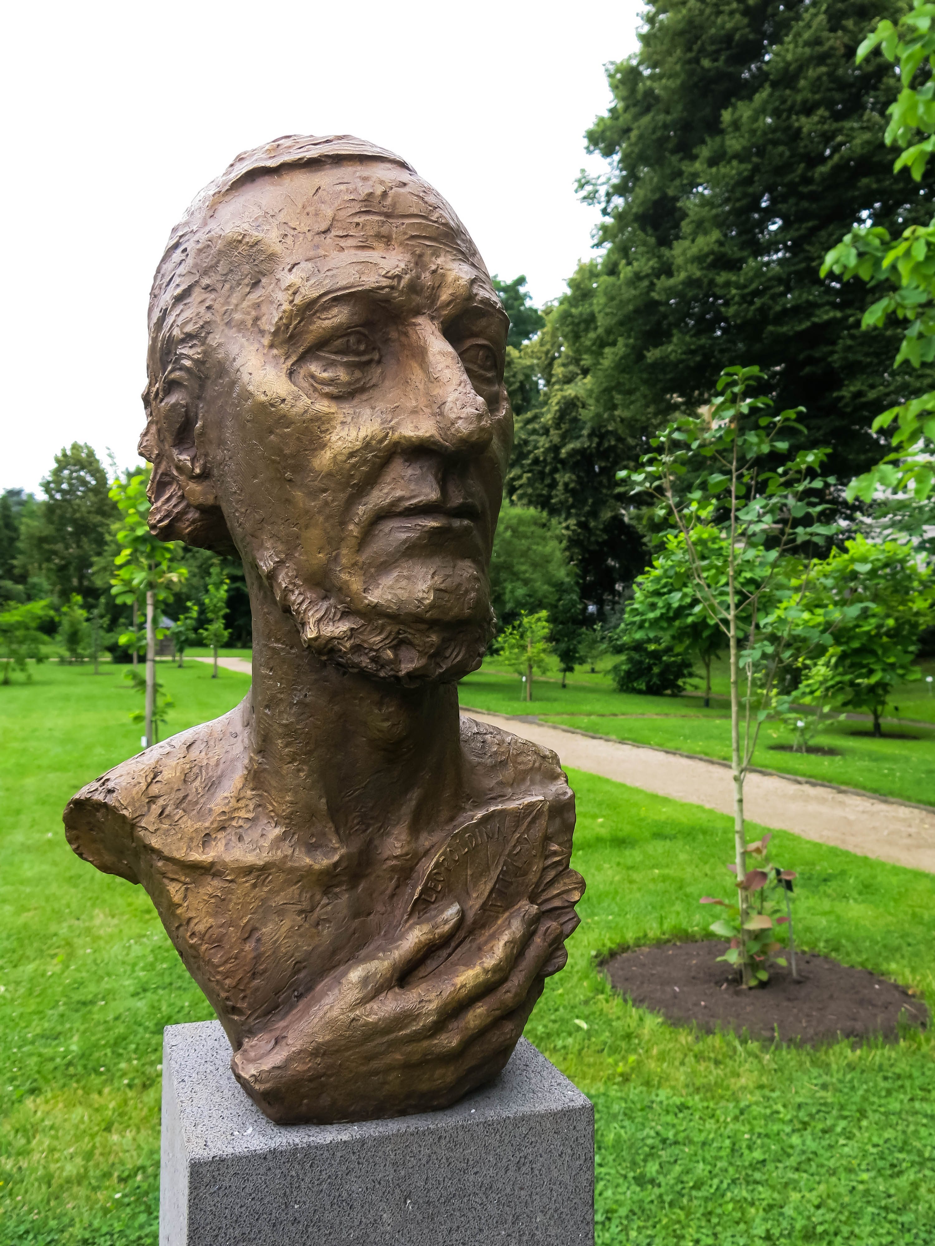 Die Büste von Christian Gottfried Daniel Nees von Esenbeck, dem Gründungsdirektor der Bonner Botanik, wurde 2018 durch den Bildhauer Bernd Göbel geschaffen und von der Leopoldina gestiftet.